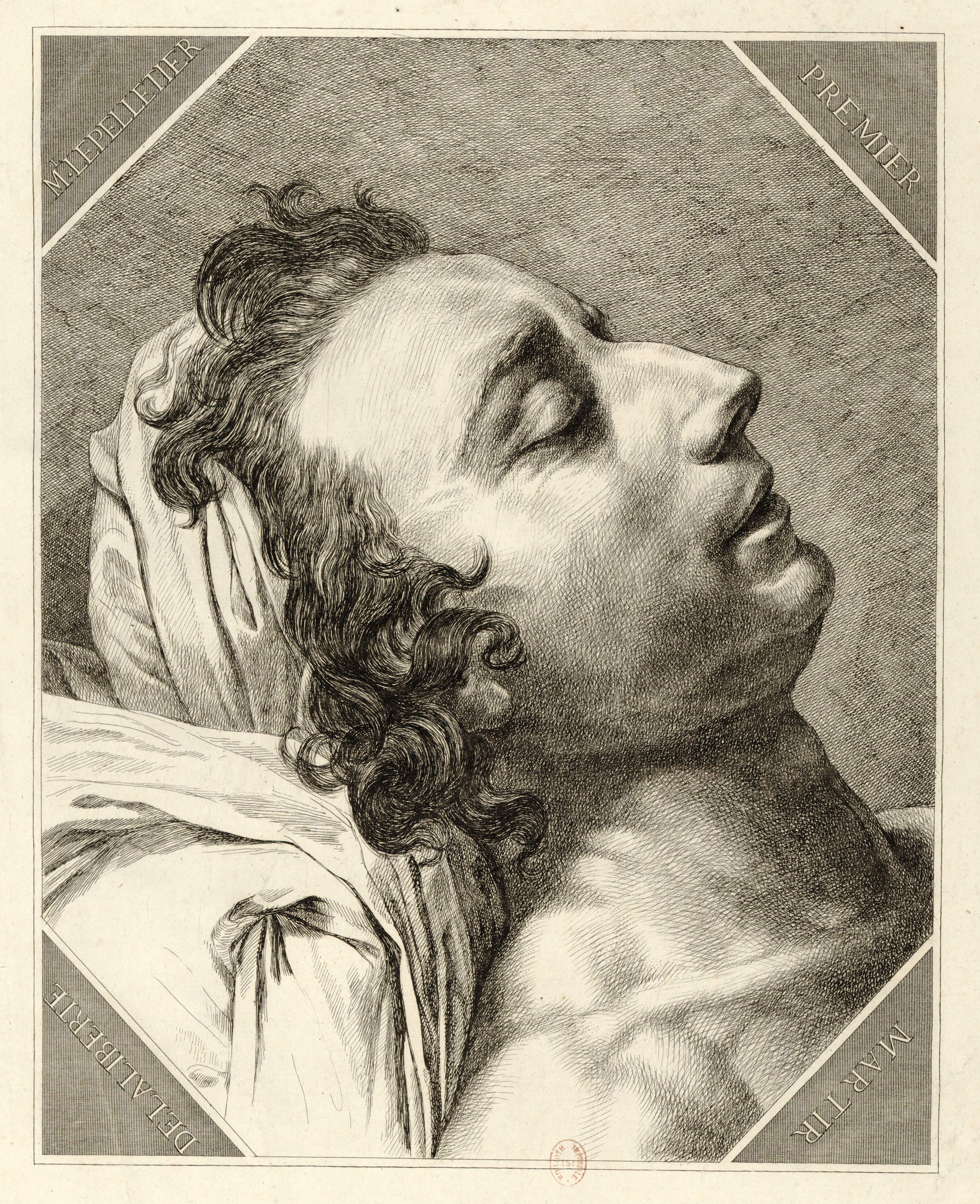 Denon - M Lepelletier sur son lit de mort d'après David (1793)